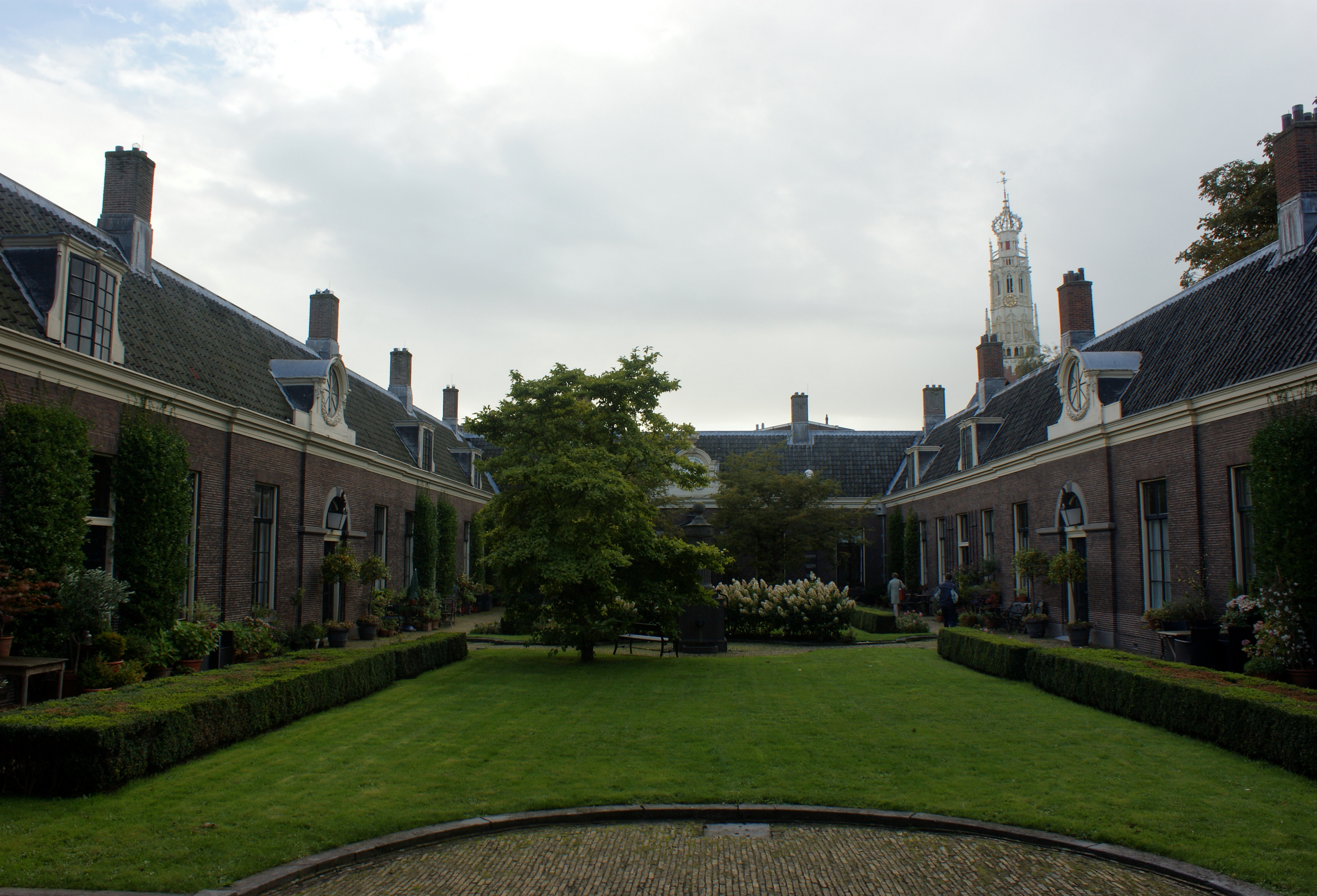 L'hospice dit Teylers Hofje, sis au n° 64 de la rue Koudenhorn (sur le quai de la Spaarne). À l'arrière-plan à droite, flèche de l'église Bakenesserkerk.